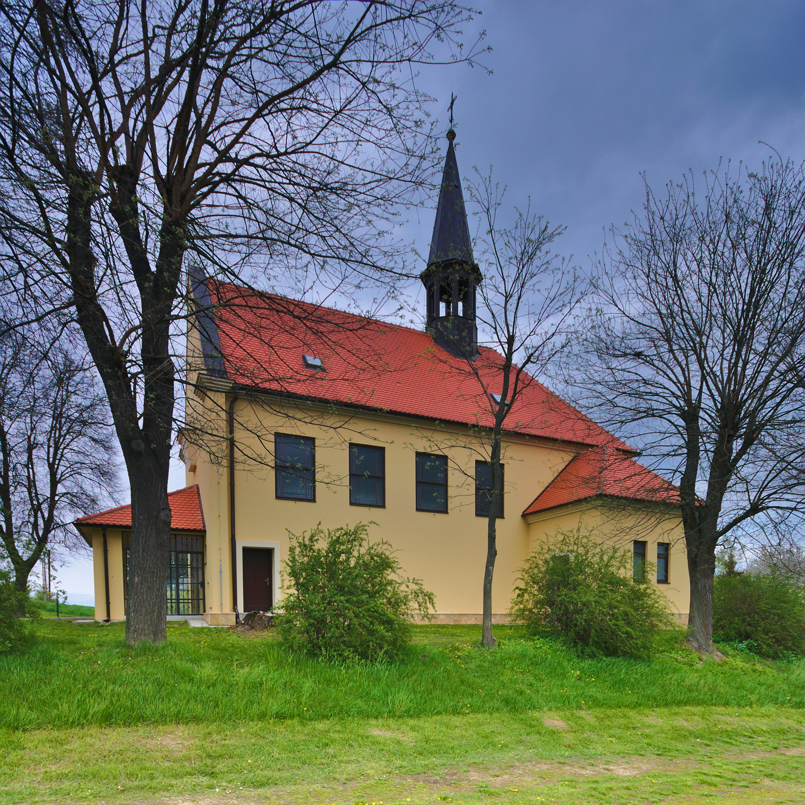 Kaple svatého Antonína, Koválovice u Tištína, Koválovice-Osíčany, okres Prostějov